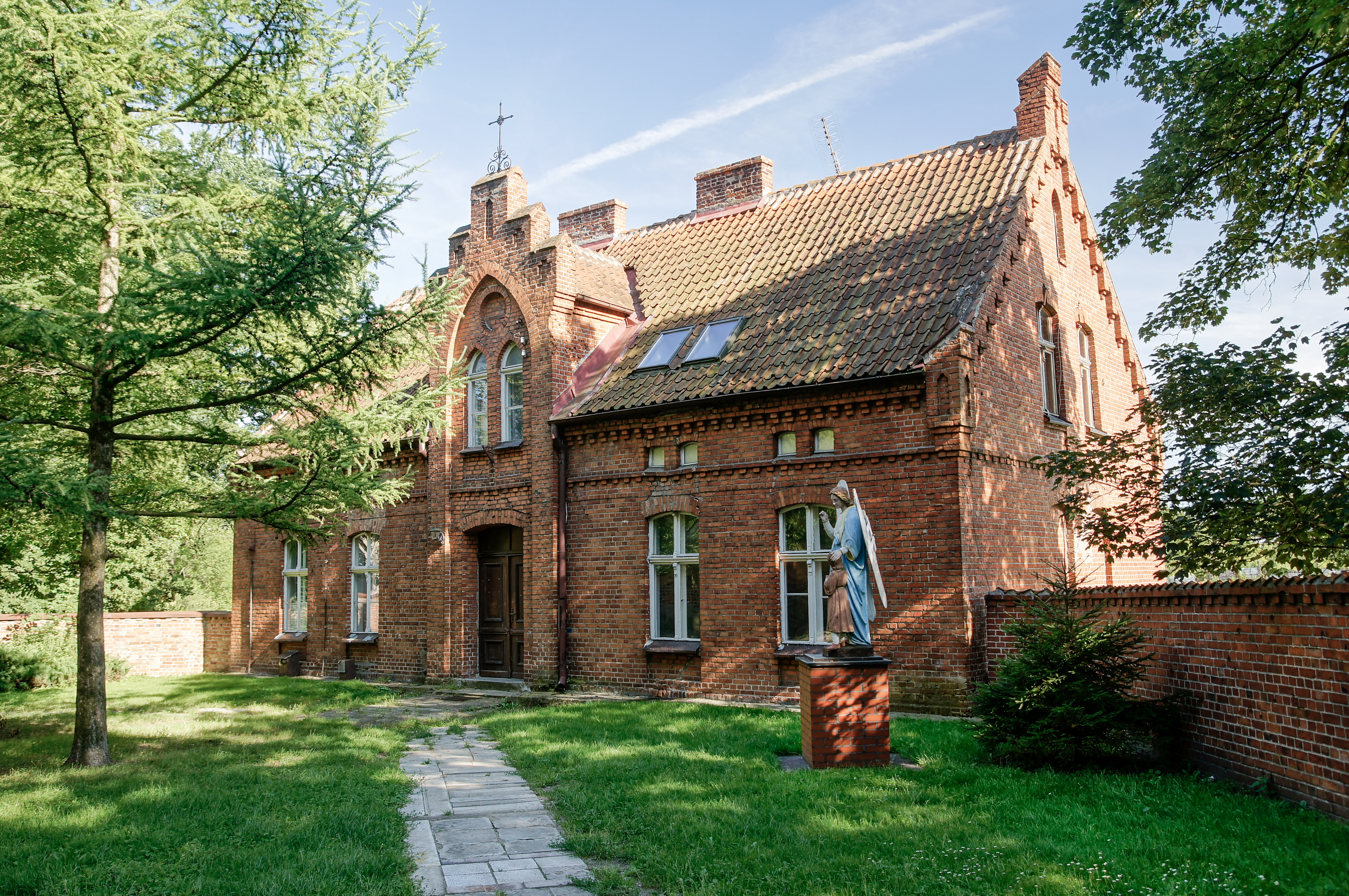 Neogotycka plebania parafii Jana Chrzciciela, Orneta, ul. Kościelna 1. Zdjęcie w technice HDR.